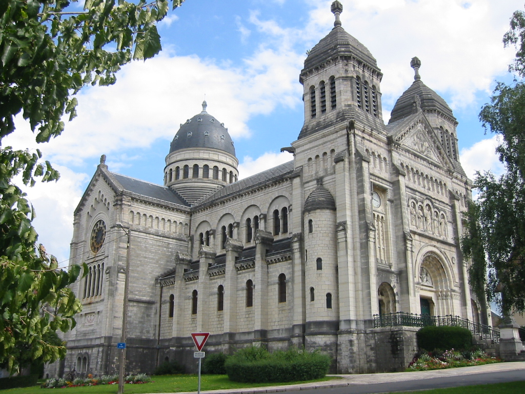 Église Saint-Ferjeux (près de Besançon)